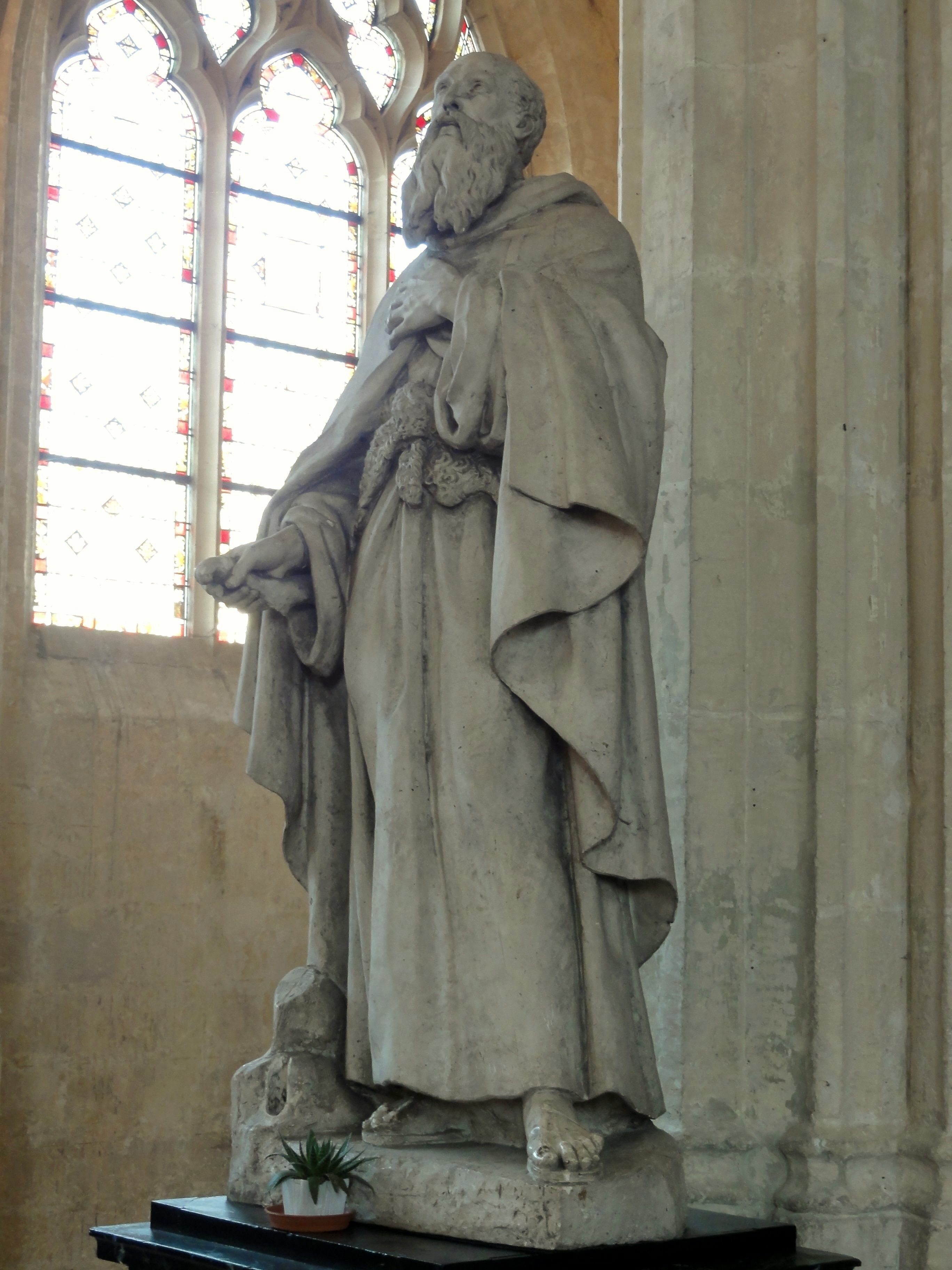 Statue de saint Antoine par Grienewald, du XIXe siècle.